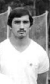 Title: Mannschaftsfoto 1. FC Union Berlin Factual corrections and alternative descriptions are encouraged separately from the original description. Additionally errors can be reported at this page to inform the Bundesarchiv. Original historic description: ADN-ZB-Mittelstädt-23.8.83-zin-Berlin: Die Mannschaft des 1. FC Union Berlin für die Fußball-Oberligasaison 1983-84. Vorn v.l.n.r.: Peter Riedtke, Torhüter Björn Dahms, Torhüter Wolfgang Gehrke und Bernd Quade. Mitte v.l.n.r.: Olaf Seier, Olaf Reinhold, Peter Wirth, Reiner Thomas und Ingo Kimmritz. Hinten v.l.n.r.: Henry Treppschuh, Mannschaftskapitän Lutz Möckel, Lutz Hovest, Holger Sattler, Heiko Lahn, Uwe Borchardt und Lutz Hendel.